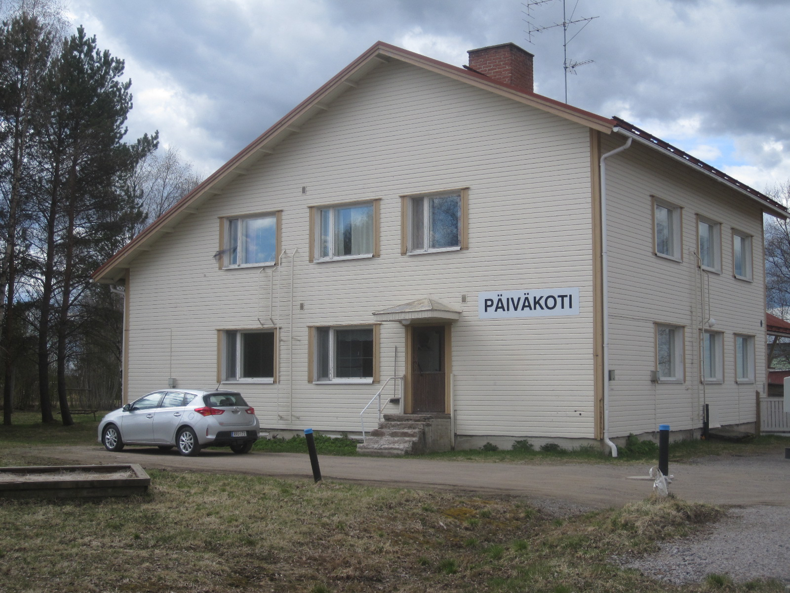 Jokisillan päiväkodin rakennus Tyrnävän Jokisillan kylässä. Rakennuksessa on aiemmin ollut Jokisillan peruskoulu, joka lakkautettiin vuonna 2009.